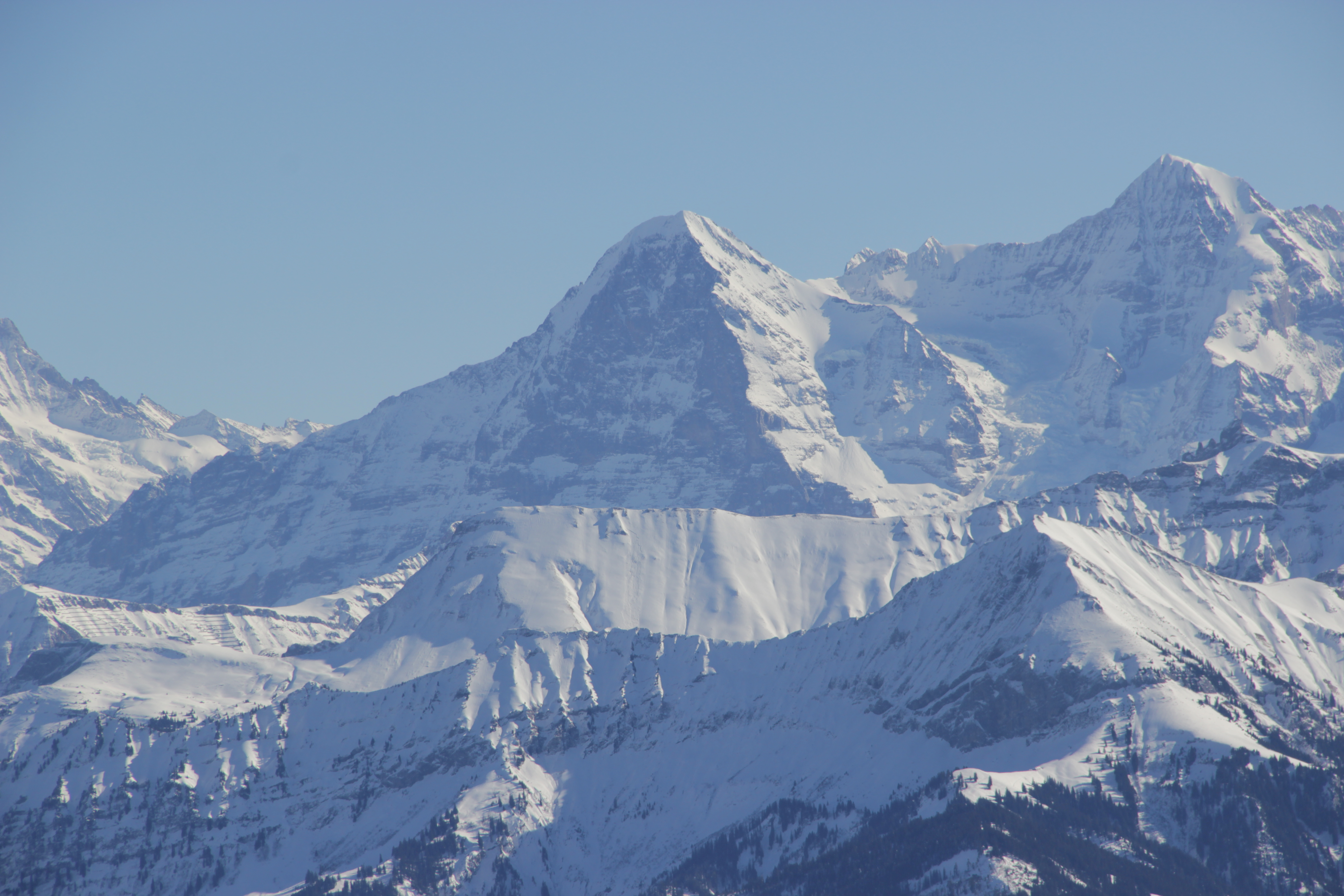 Eiger